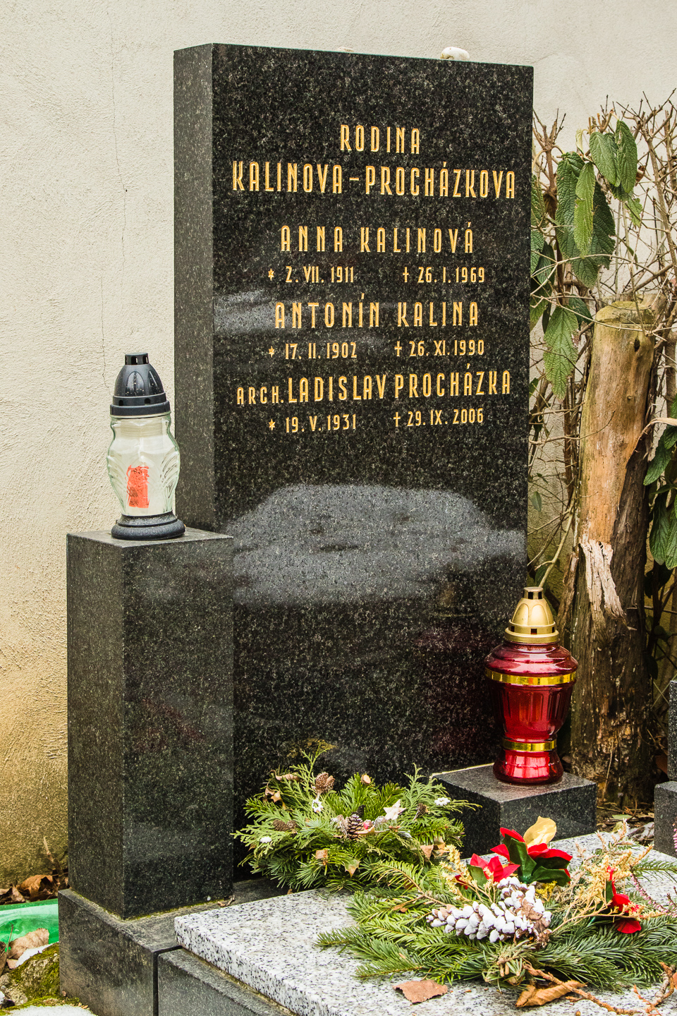 hrob 2ob-31-16uh